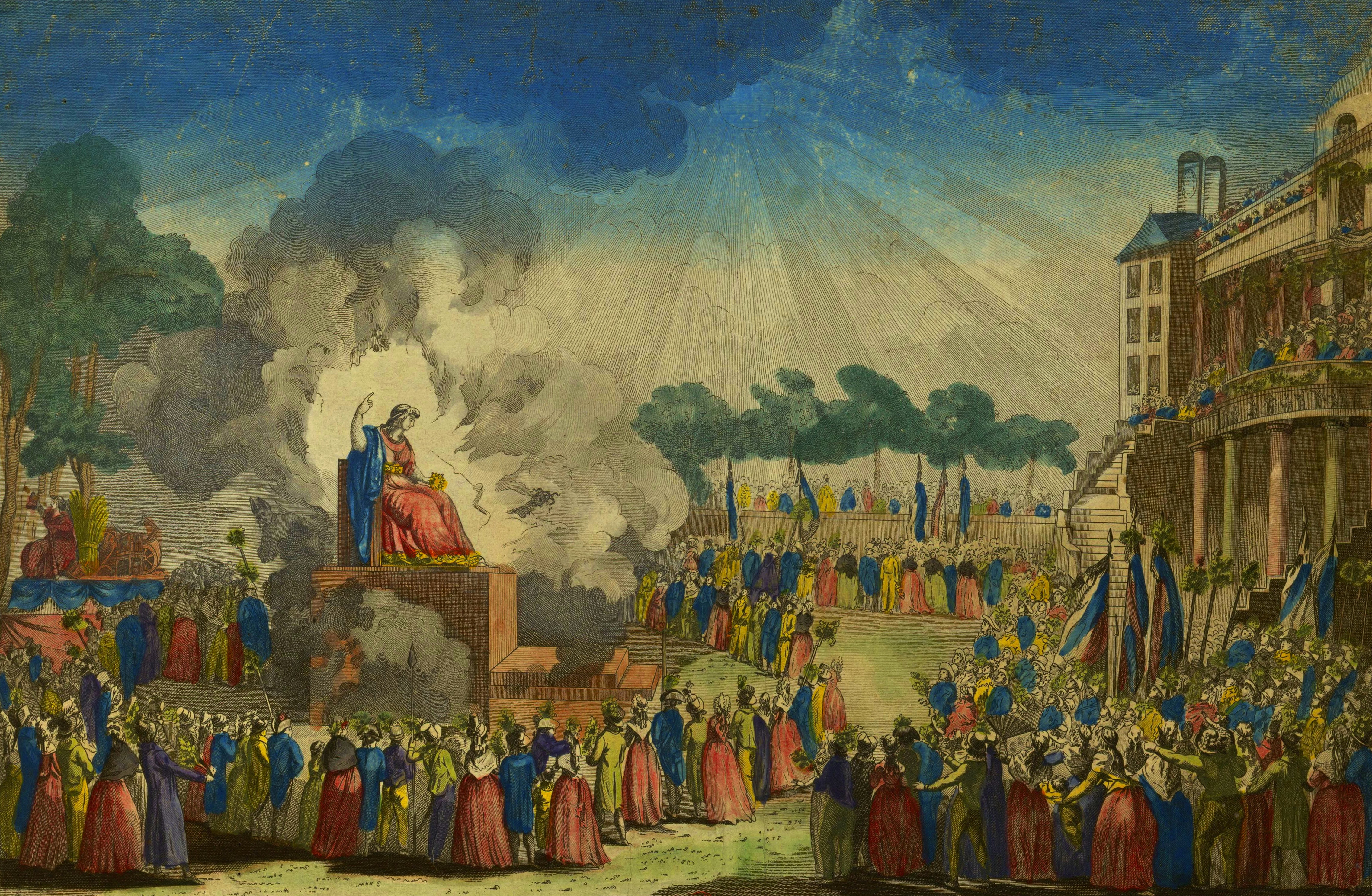 Vue du jardin national et des décorations, le jour de la fête célébrée en l’honneur de l’être suprême (Festival of the Supreme Being)